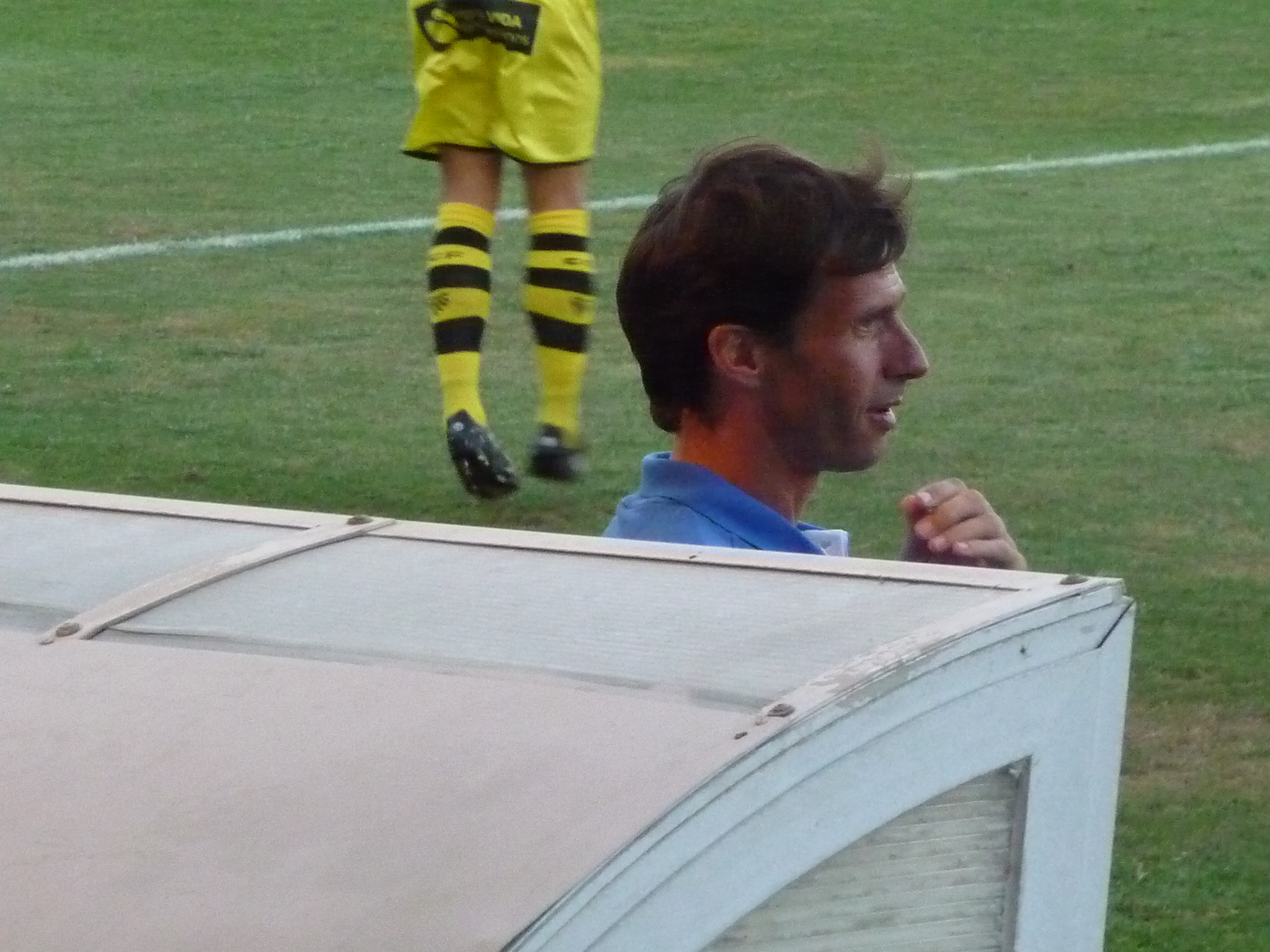 Ziganda-XerezCD-p1040381.jpg